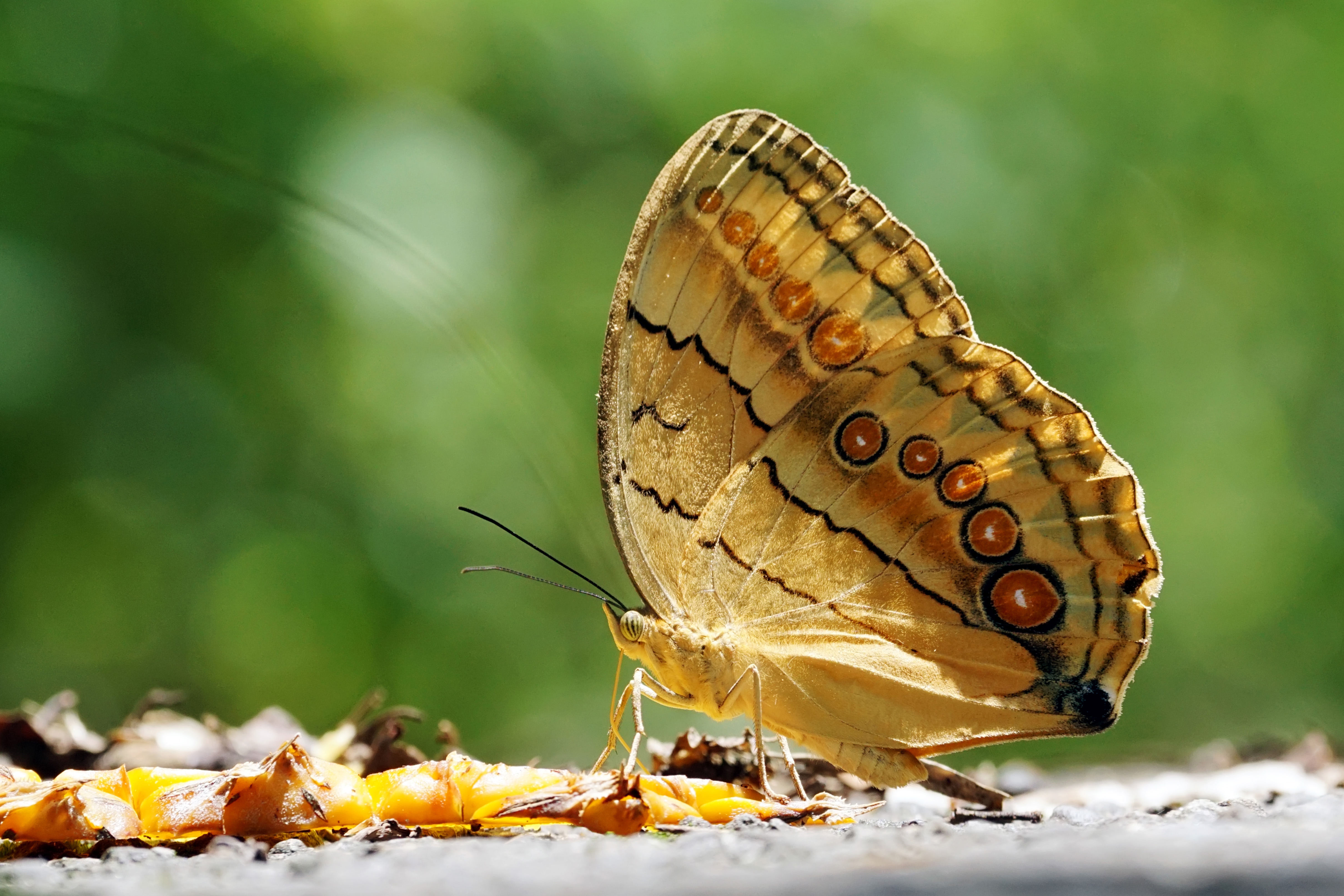 箭環蝶 Stichophthalma howqua formosana 雄